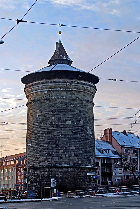 Laufer Torturm,Nürnberg